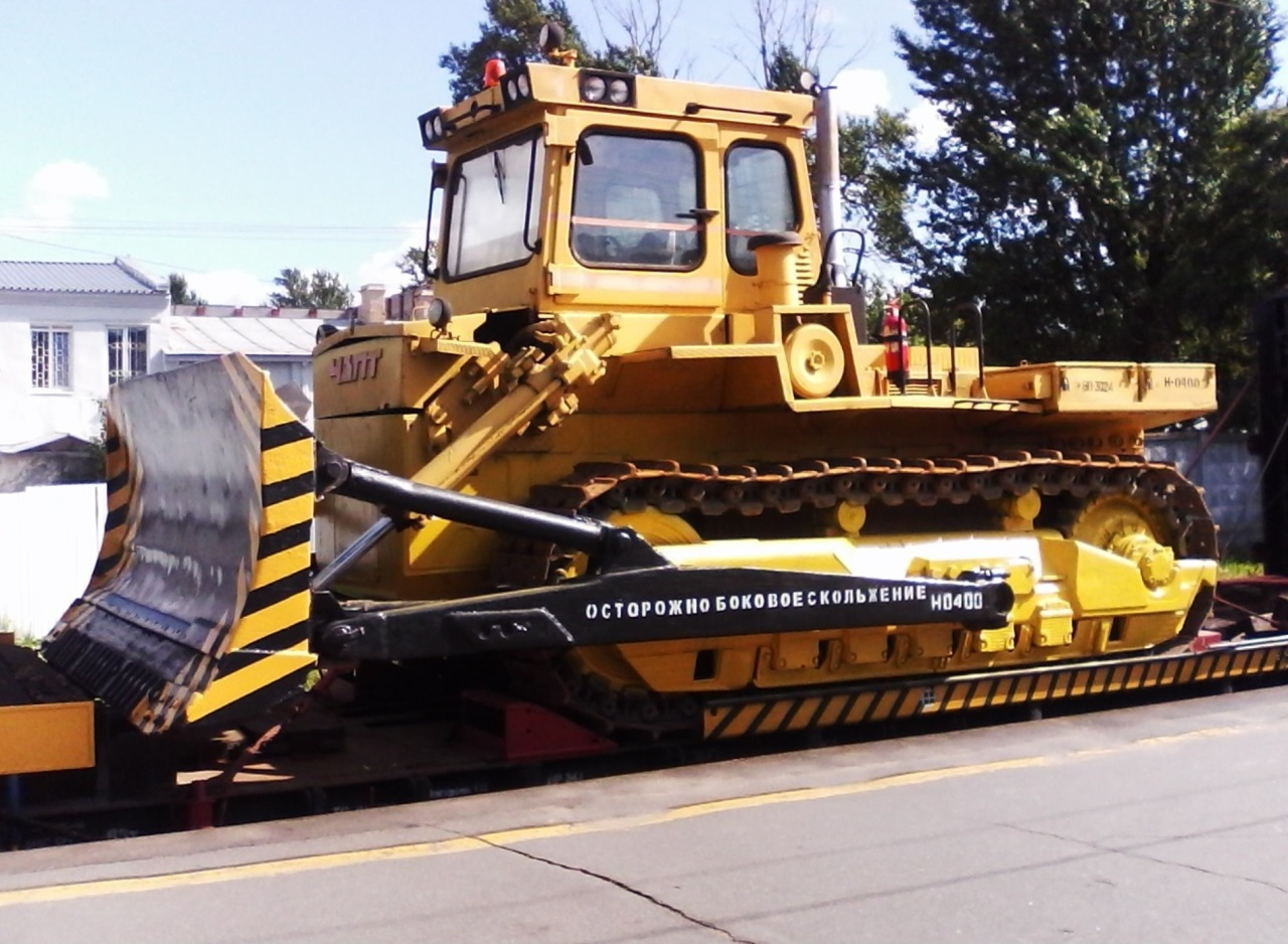 Трактор Т-330 на платформе восстановительного поезда на Финляндском вокзале Санкт-Петербурга